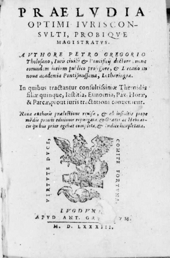 Frontespizio